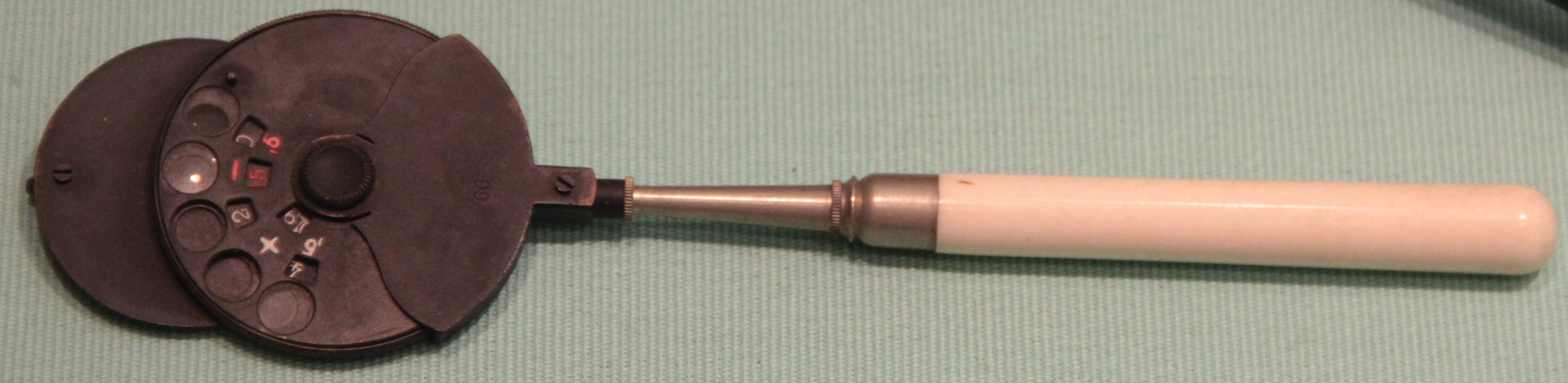 Ophtalmoscope à disques basculants de Pley. Manche en ivoire. Museum of Medical Instruments of the Hospital of Toulouse Native nameMusée des Instruments de Médecine des Hôpitaux de ToulouseParent institutionHôpitaux de ToulouseLocationToulouse, FranceCoordinates43° 35′ 57.48″ N, 1° 26′ 11.58″ E Established2004Web page control : Q3330252